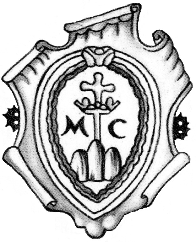 Escudo de los Ermitaños Camaldulenses de Monte Corona